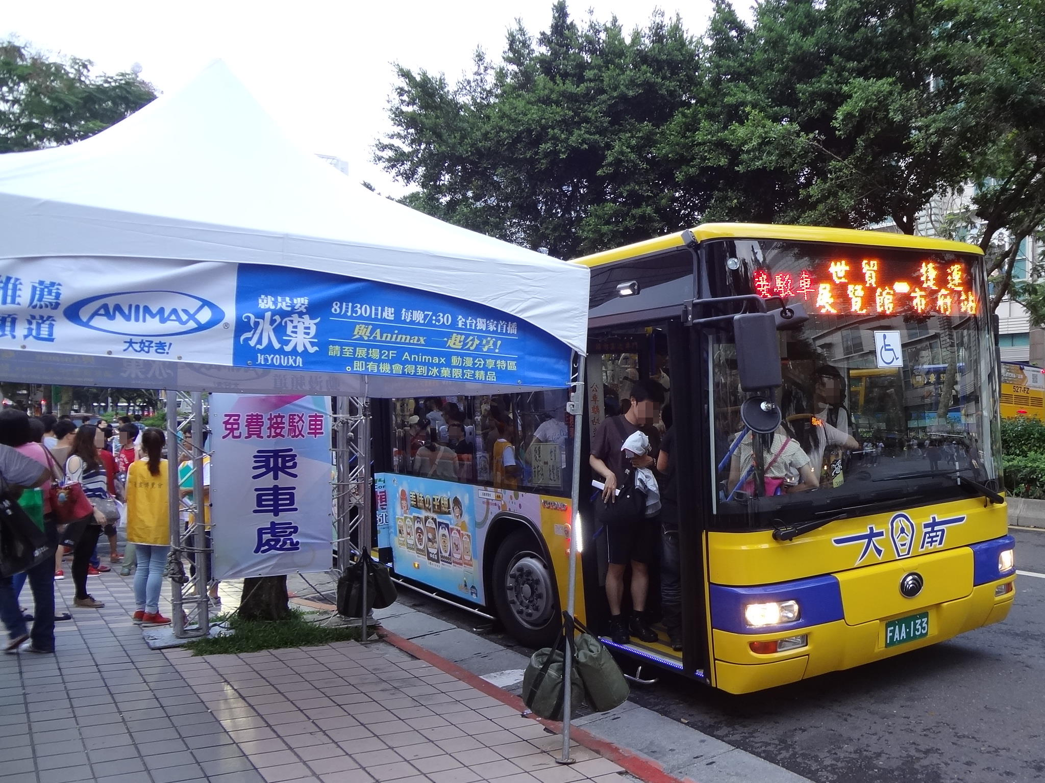 大南汽車宇通ZK6128HG大客車FAA-133，行駛2013年（第14屆）漫畫博覽會接駁車末班車。